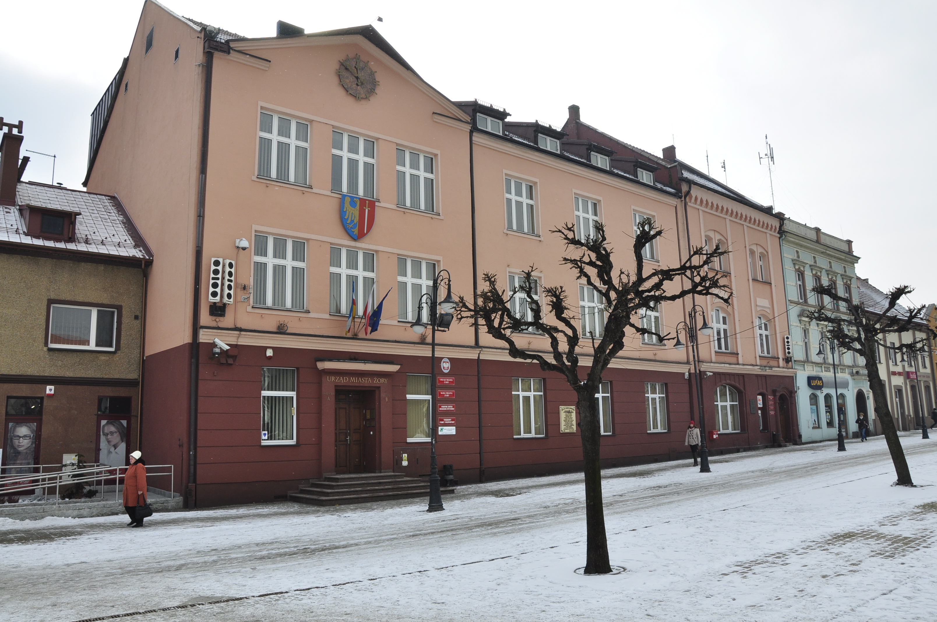 Urząd Miejski, Żory. Rynek.